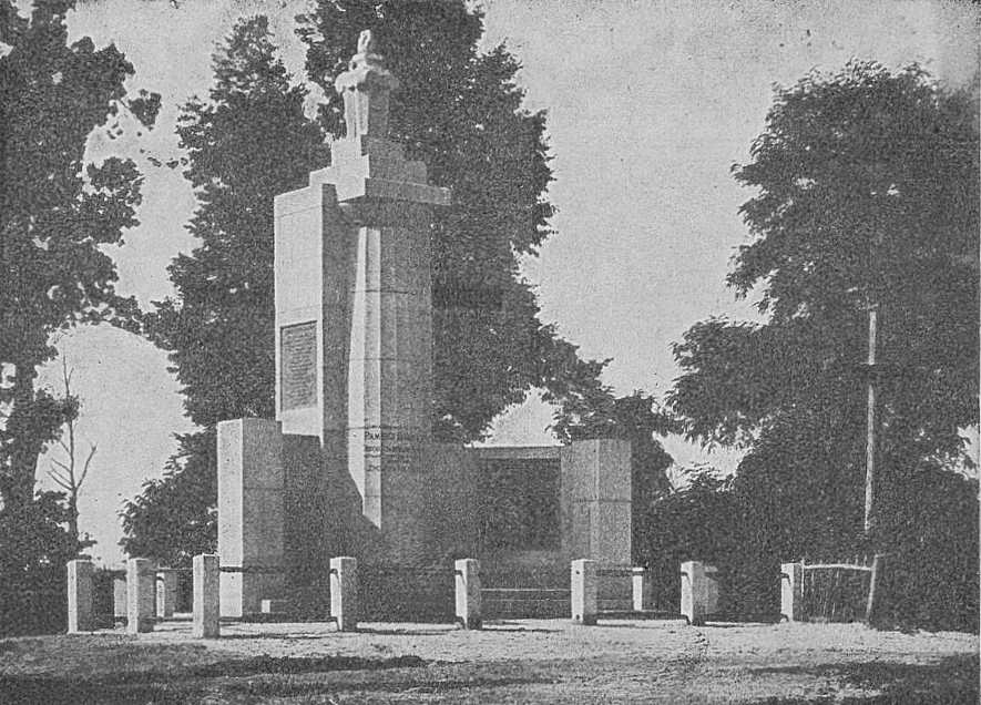 Pomnik Obrońców Lwowa na Persenkówce (pocztówka z 1925)